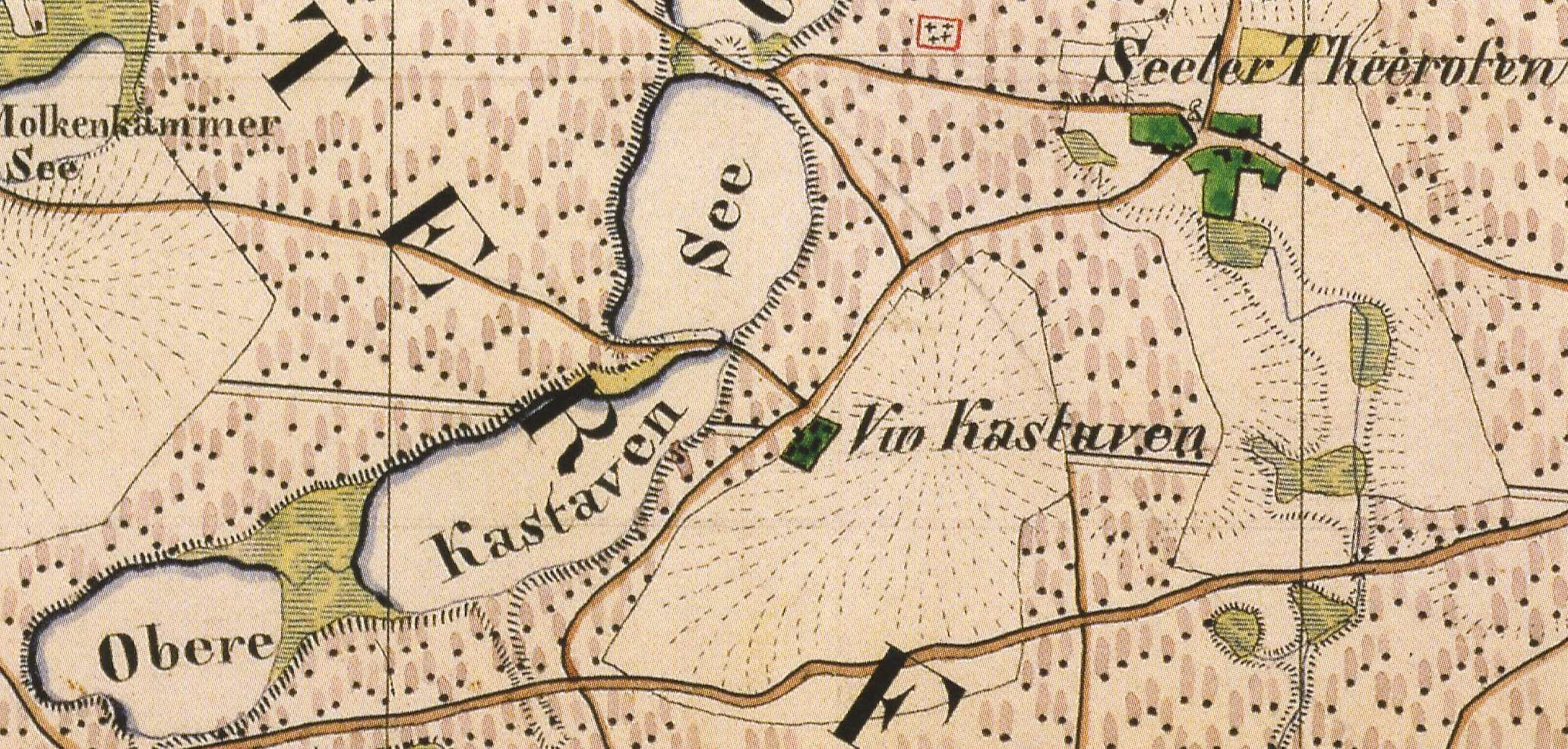 Sähle, Wohnplatz von Retzow, Ortsteil von Lychen, Lkr. Uckermark, Brandenburg, Ausschnitt aus dem Urmesstischblatt Blatt 2745 Lychen von 1825